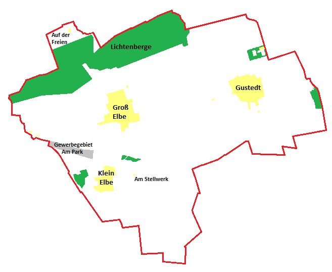 Lagekarte der Ortsteile innerhalb der Gemeinde Elbe